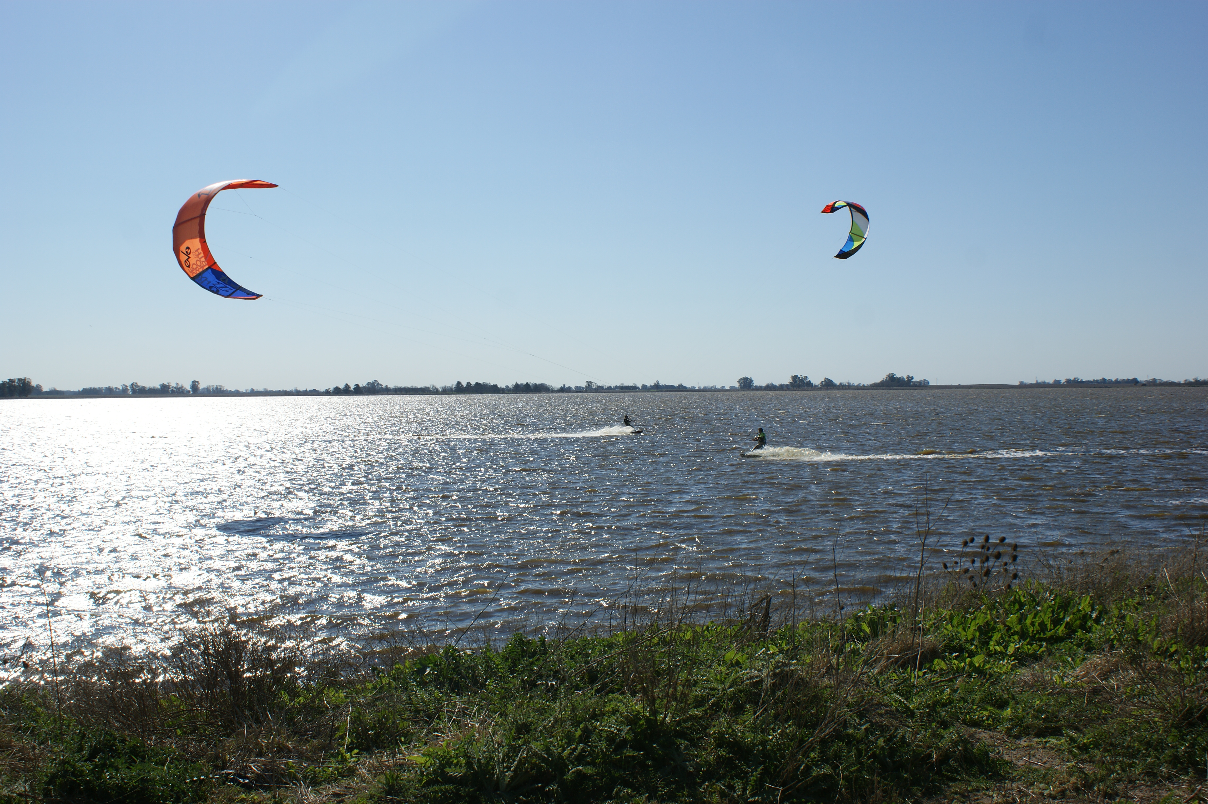 Deportes